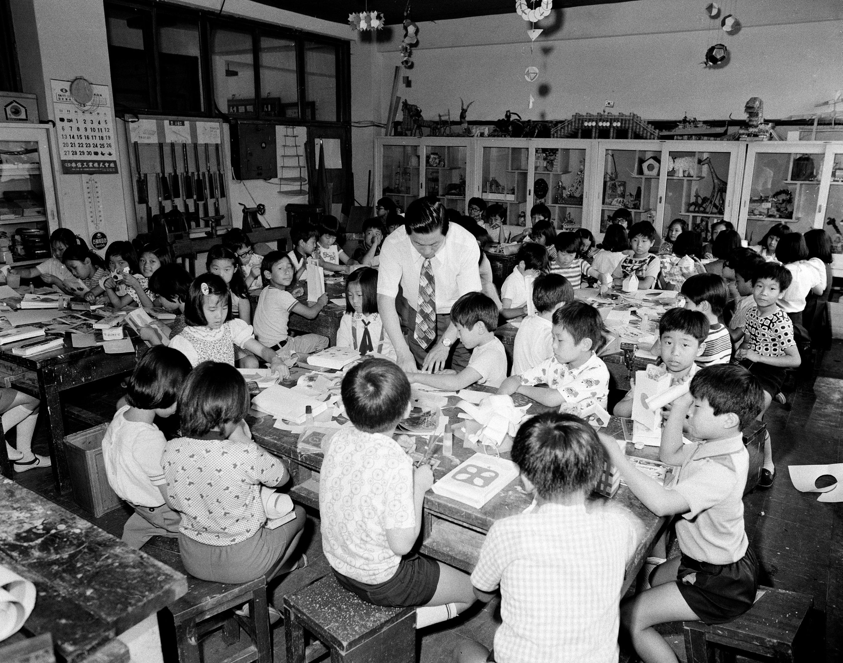 촬영일 : 1976년 06월 24일 촬영장소 : 대한민국 서울 경복초등학교 참석자 : 미상 인물상세정보 : 미상(전체) 관련내용 : 경복초등학교 교실의 수업 광경